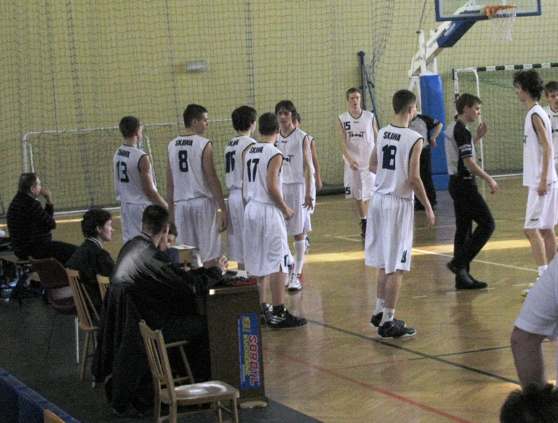 Zmiana na boisku podczas meczu koszykówki